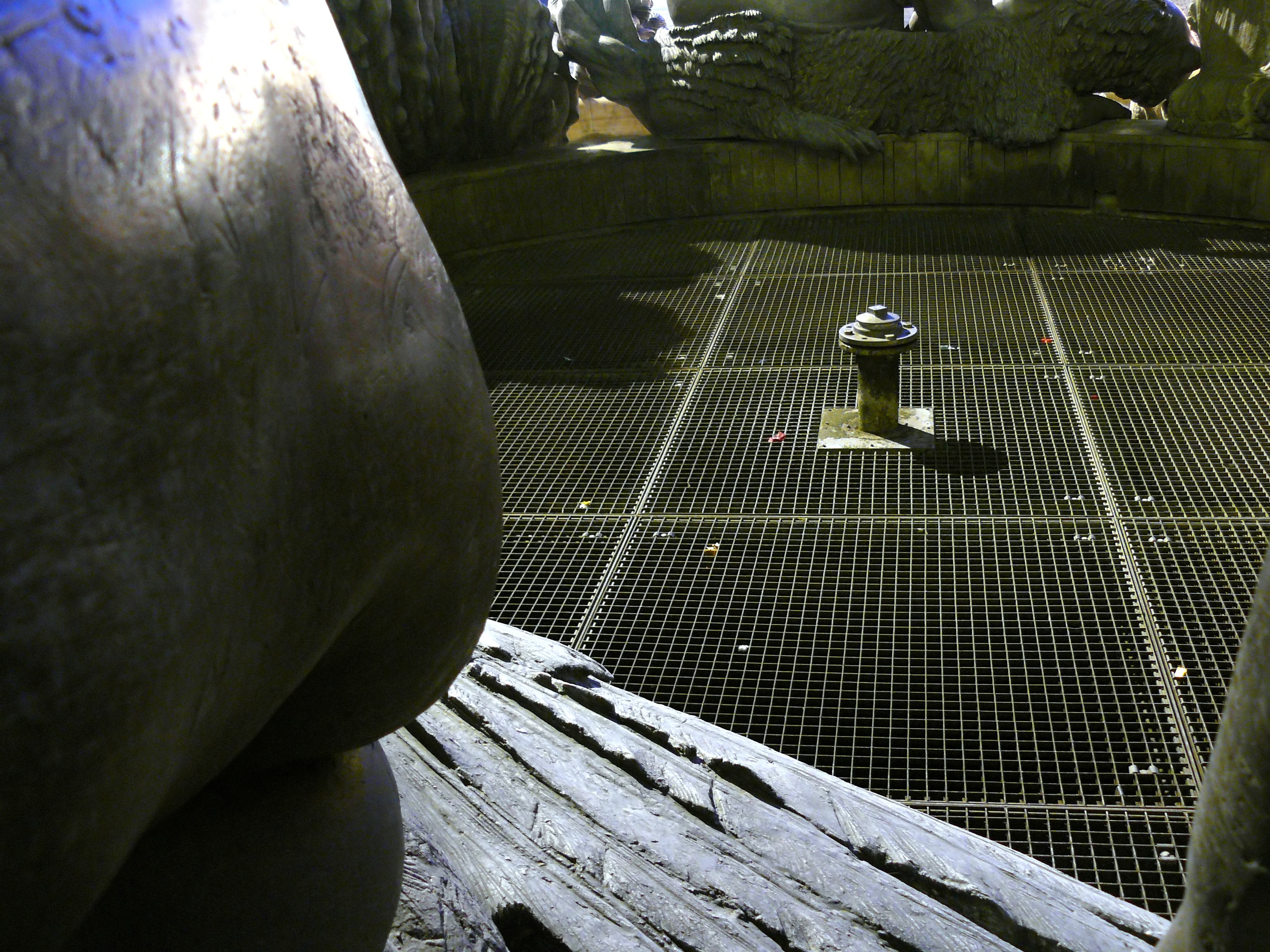 Entlüftungsschacht des U-Bahnhof Weißer Turm im Ehekarussell